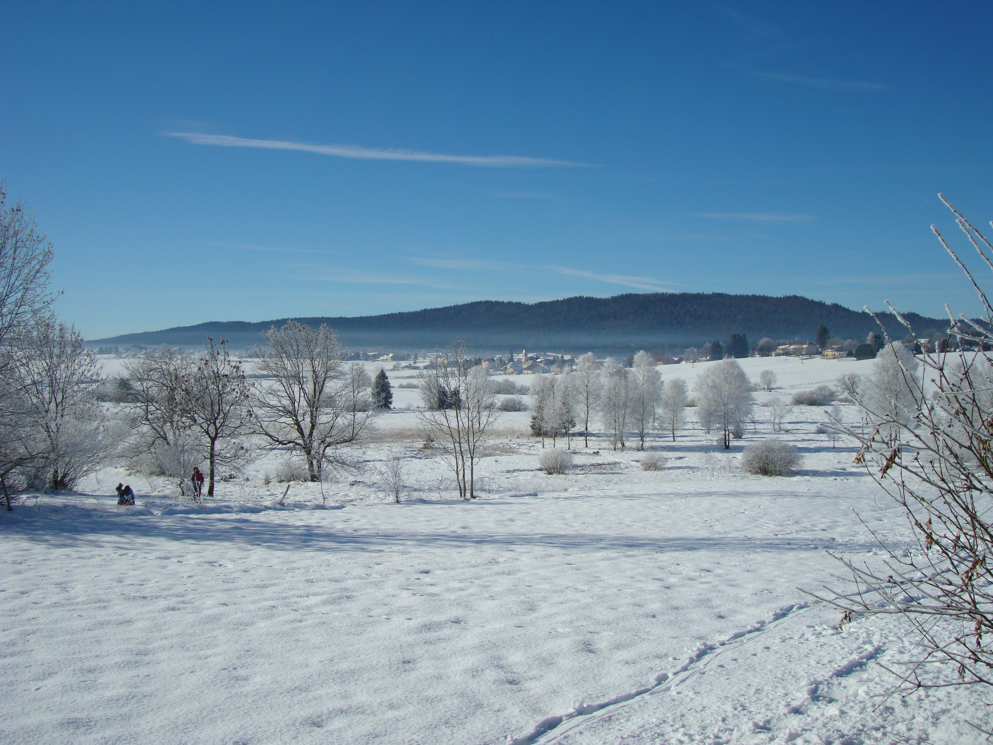 Saint Pierre en hiver